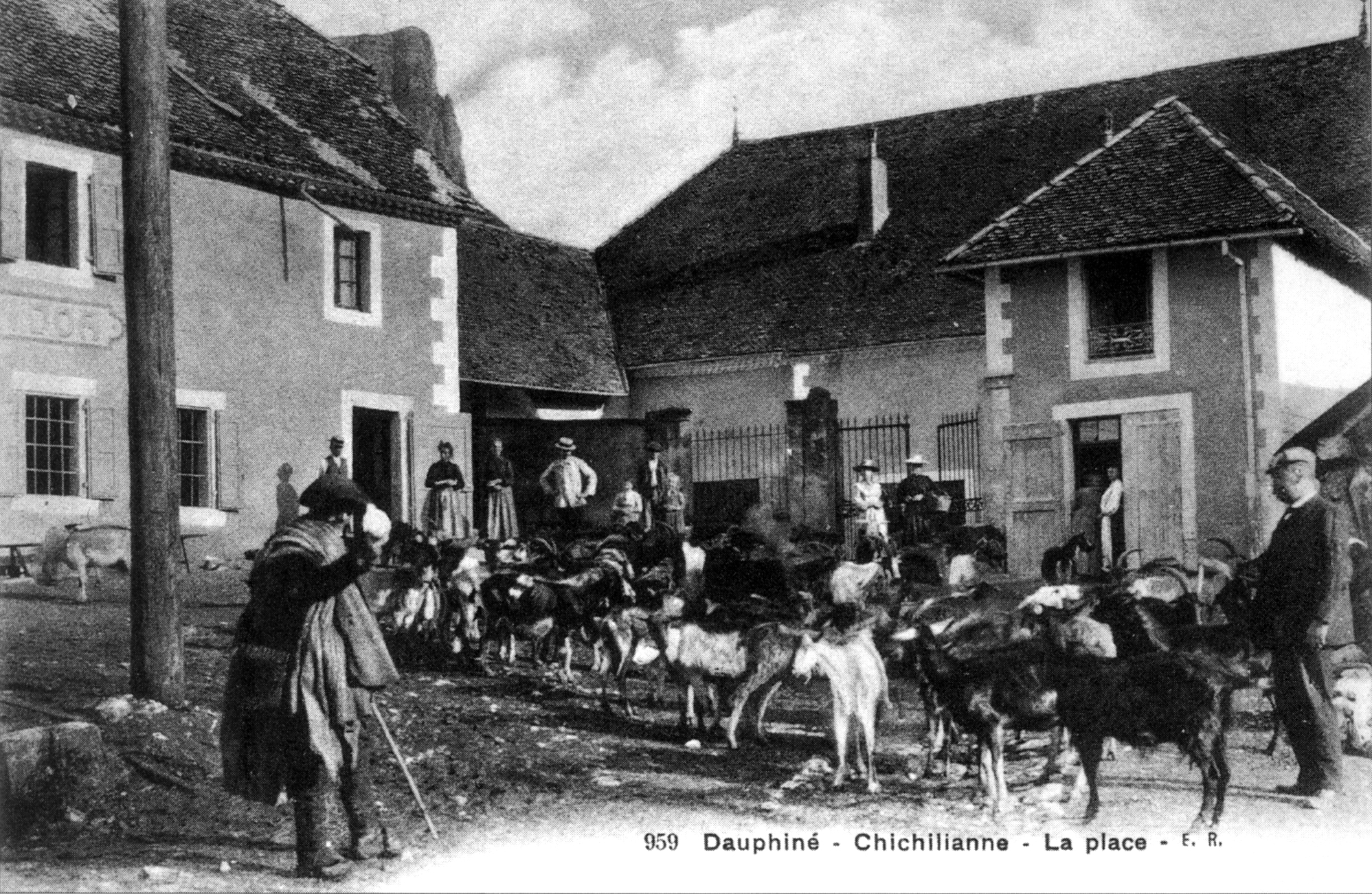 La place de Chichilianne, élevage caprin (pour l'industrie des ganteries de Grenoble)